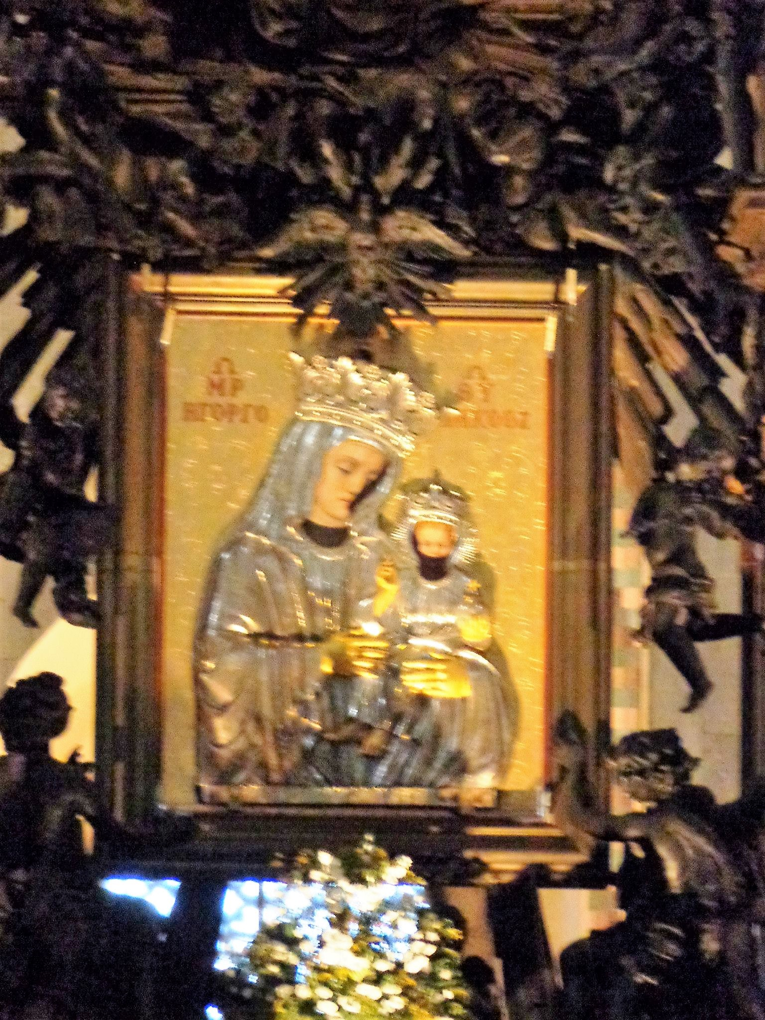 Madonna della Lettera e manta